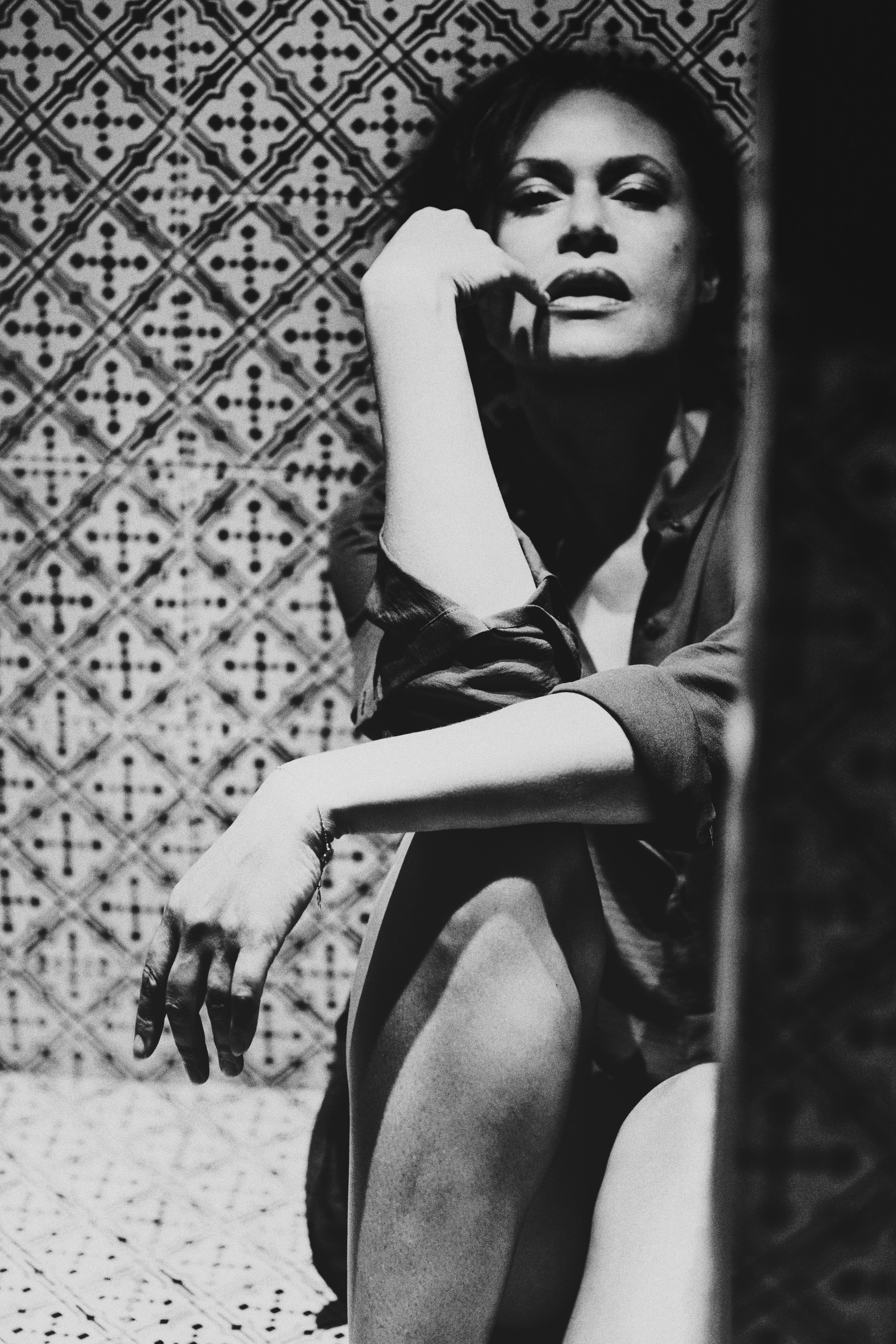 Viktor Lazlo